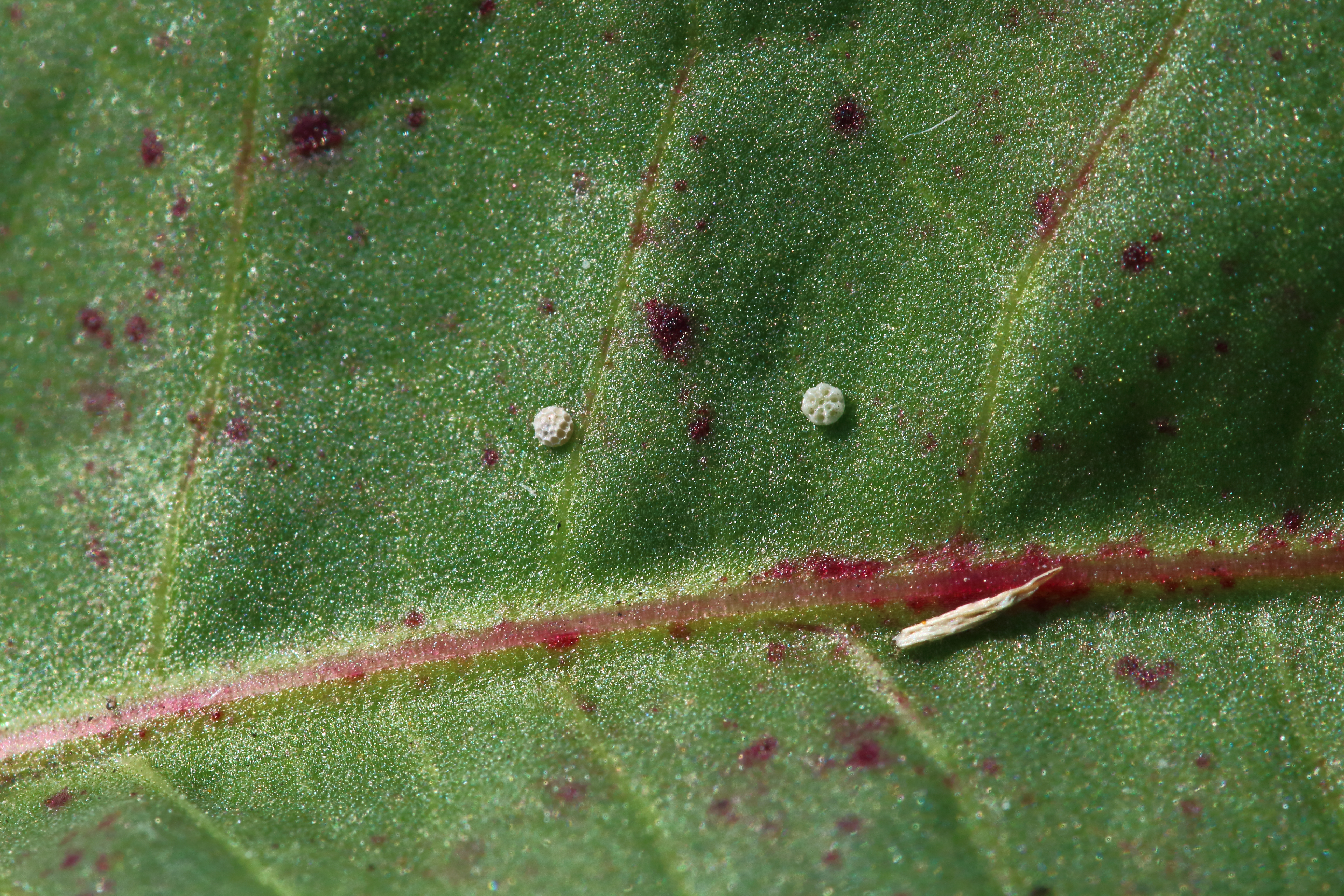 Ei des Großen Feuerfalters neben einem Ei des Kleinen Feuerfalters in der Nähe von Schutterwald in der Offenburger Rheinebene.